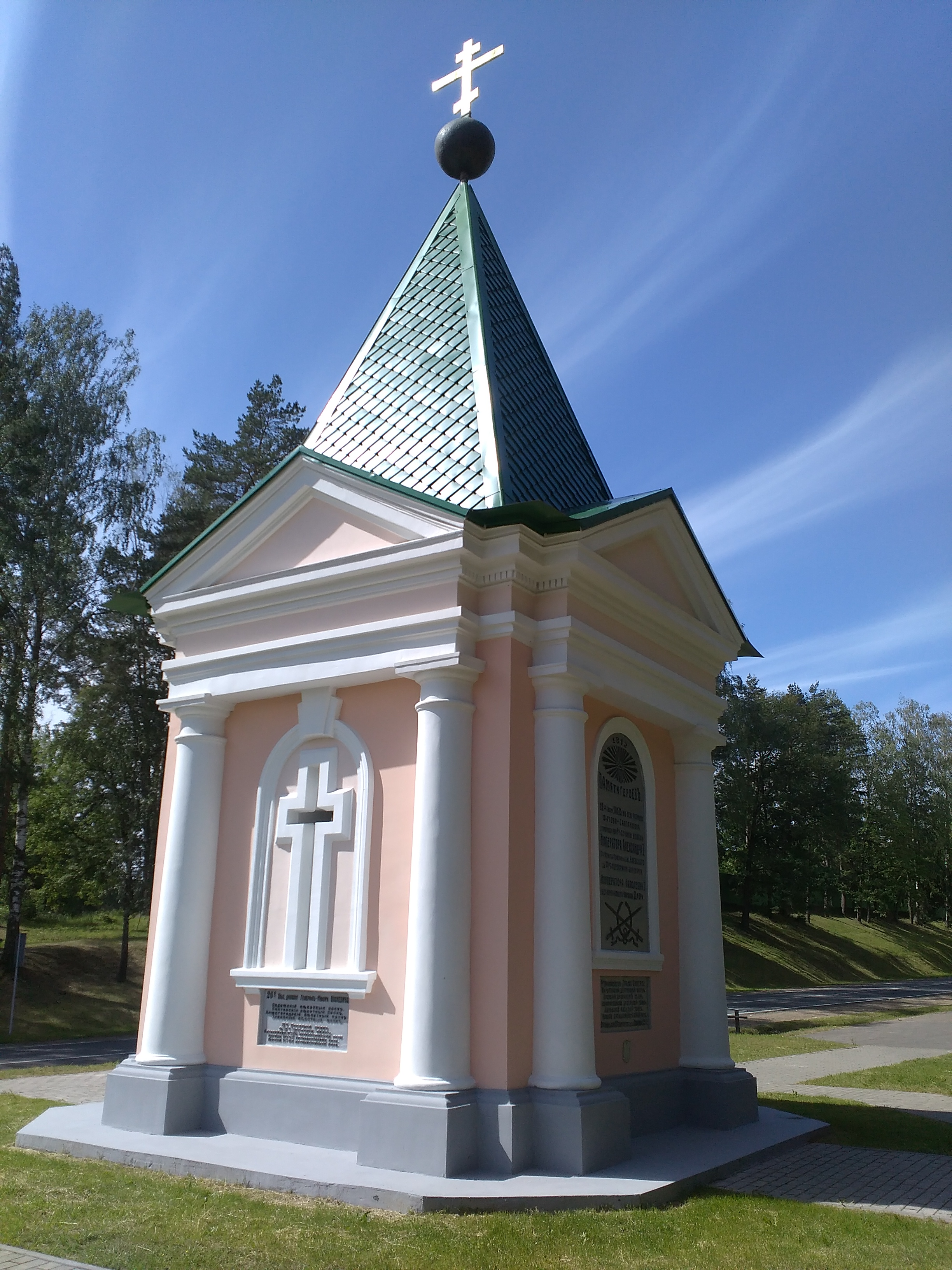 Мемориальная часовня в память об Отечественной войне 1812 года (построена в 1912 году)